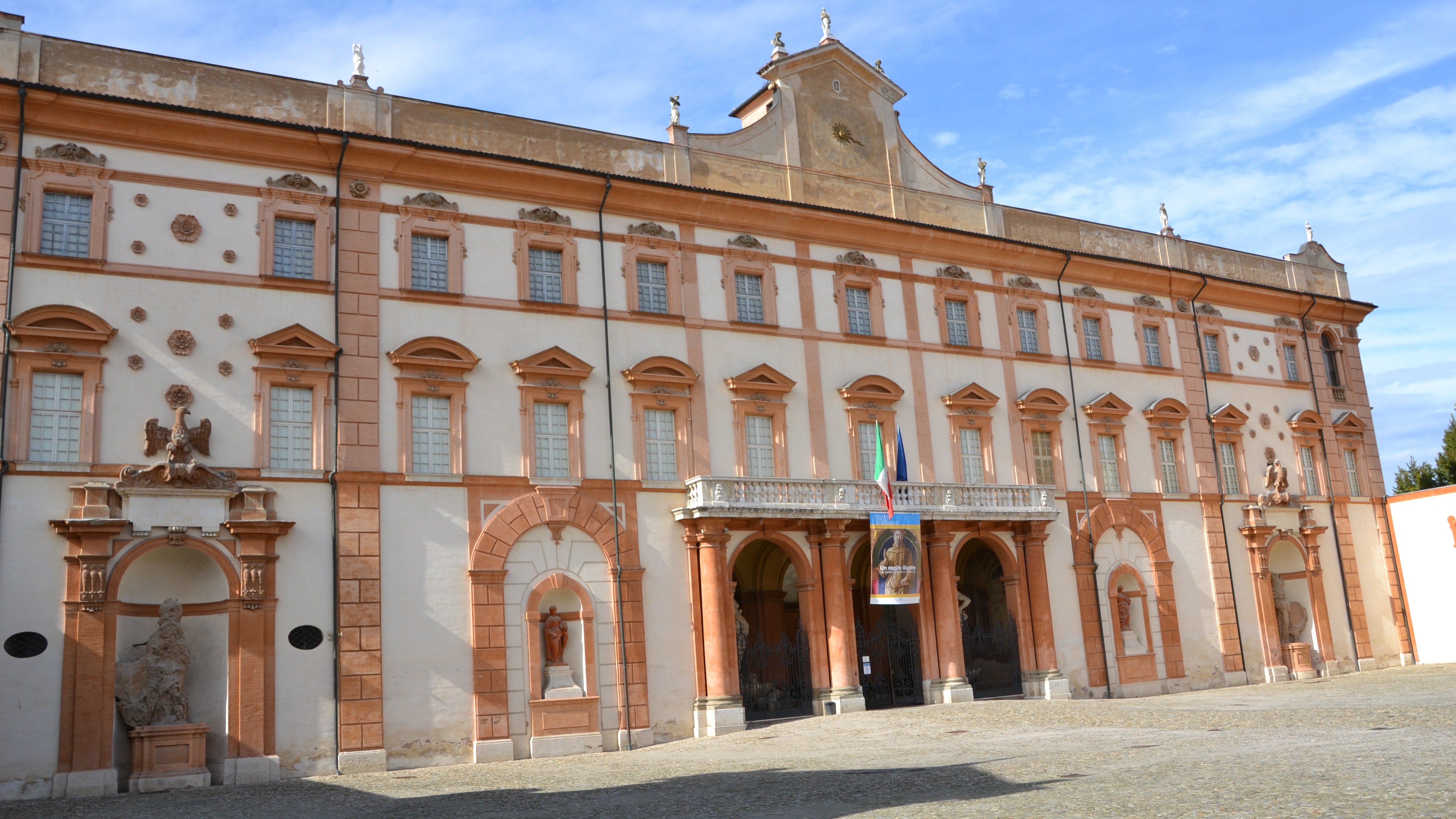 Palazzo ducale (Sassuolo) - facciata principale